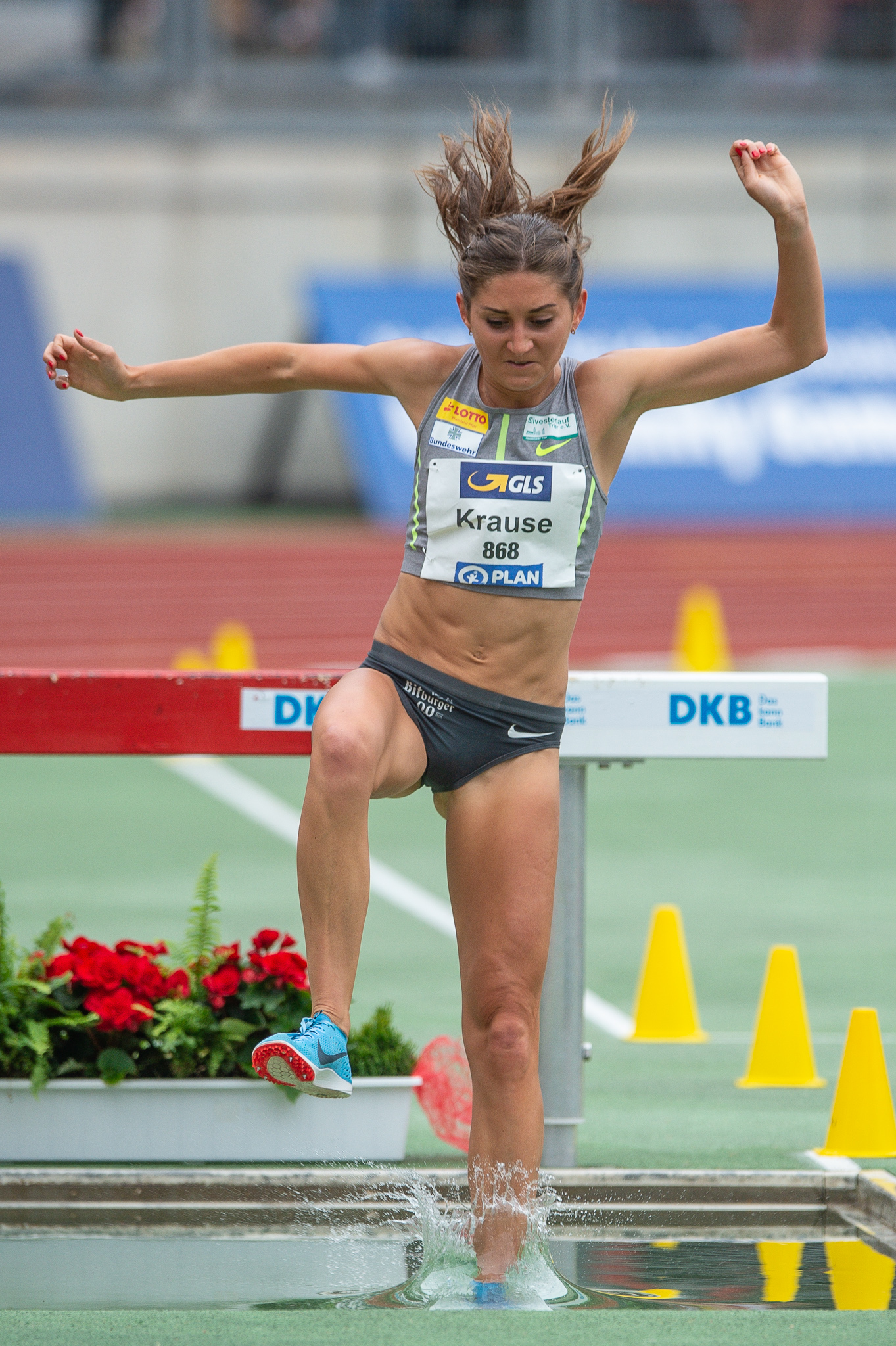 3000 Meter Hindernislauf,DLV,Deutsche Leichtathletik Meisterschaften 2018,Deutscher Leichtathletik-Verband,Gesa Felicitas Krause,Max-Morlock-Stadion,Silvesterlauf Trier,Steeplechase